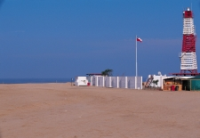 Faro limitrofe